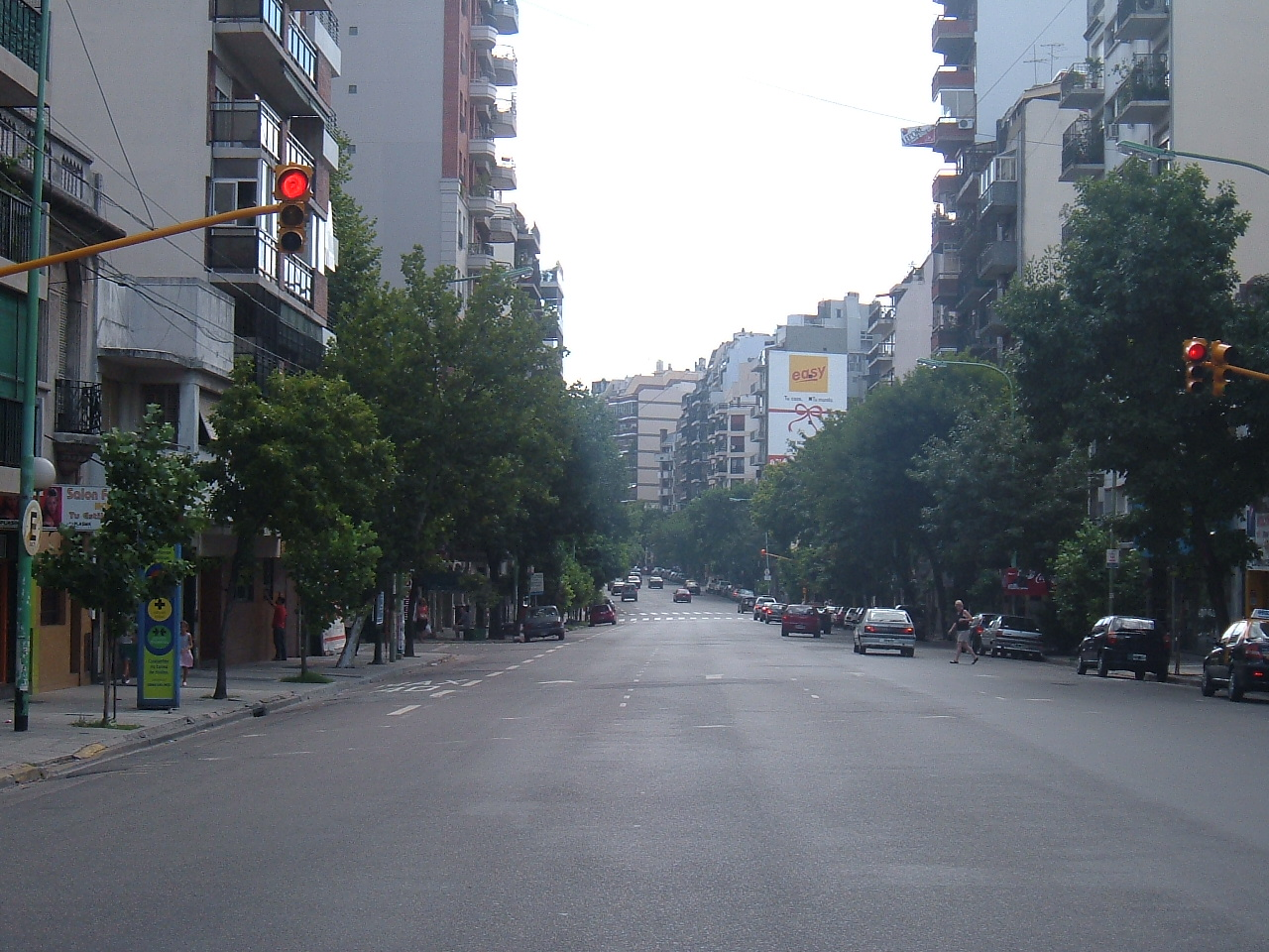 Avenida Juan B. Alberdi. Caballito, Buenos Aires.